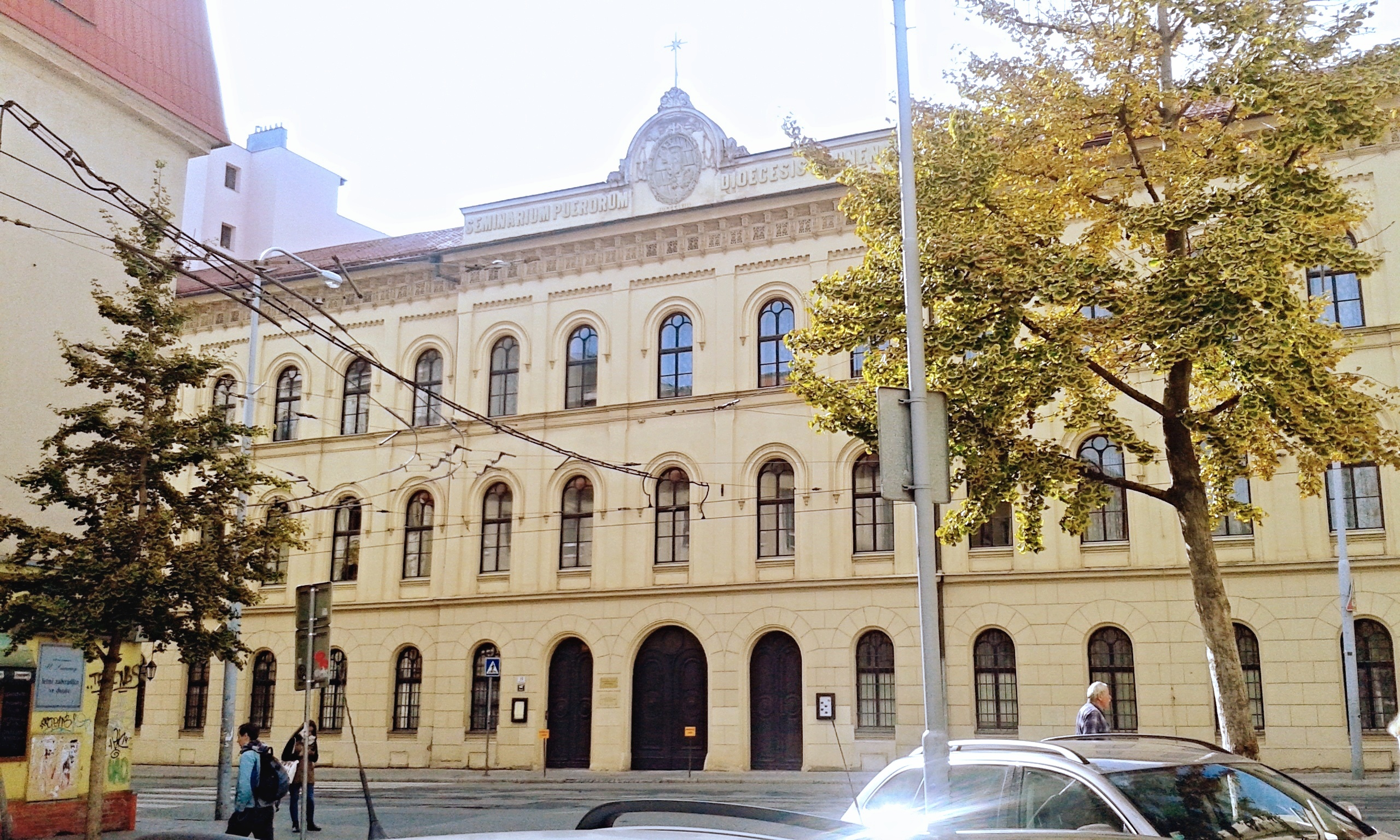 Petrinum, chlapecký seminář v Brně-Veveří